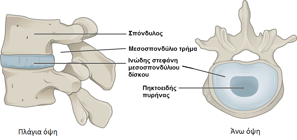 Μεσοσπονδύλιος δίσκος